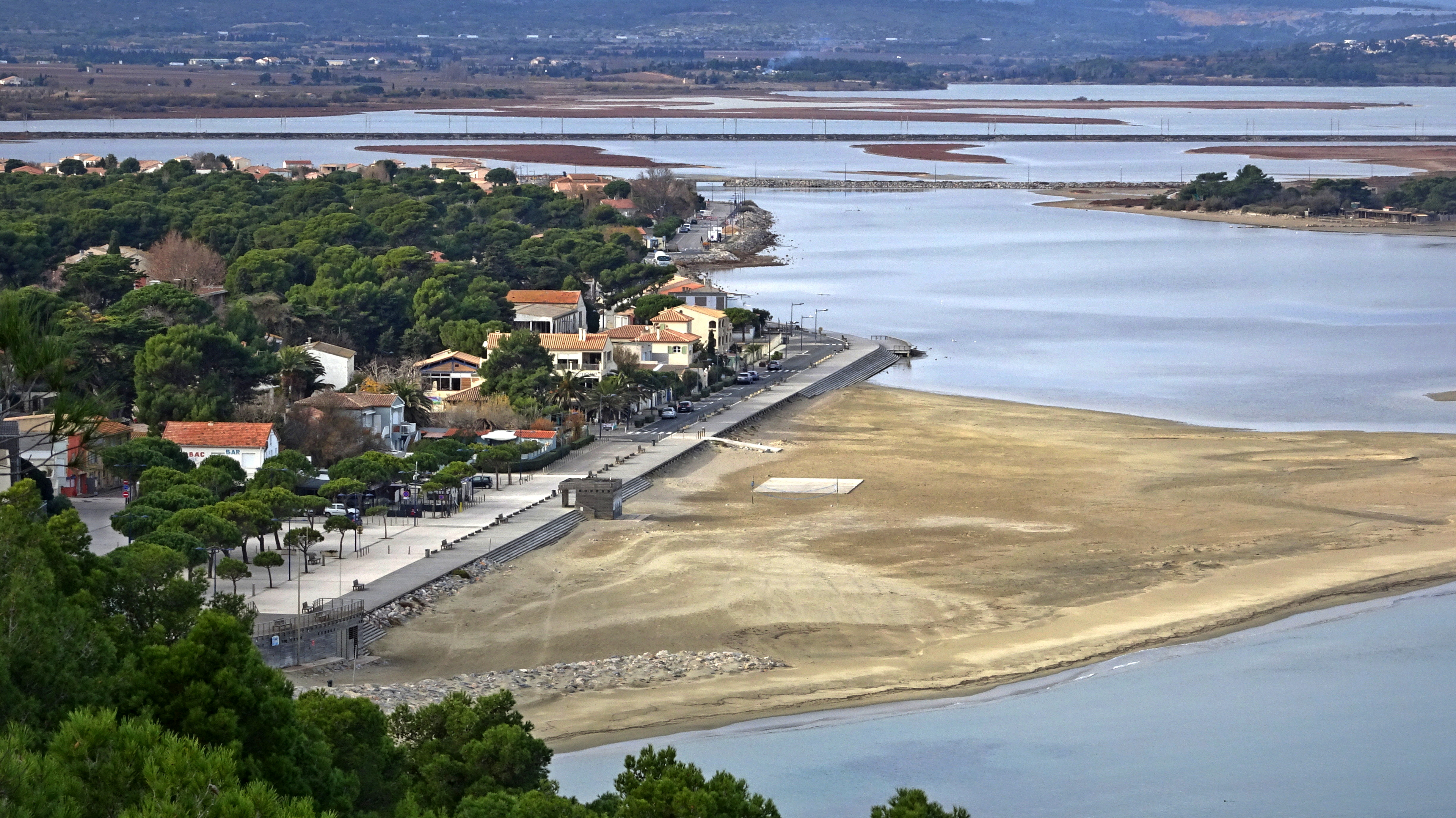 Le village et la plage de La Franqui le 13 Décembre 2017